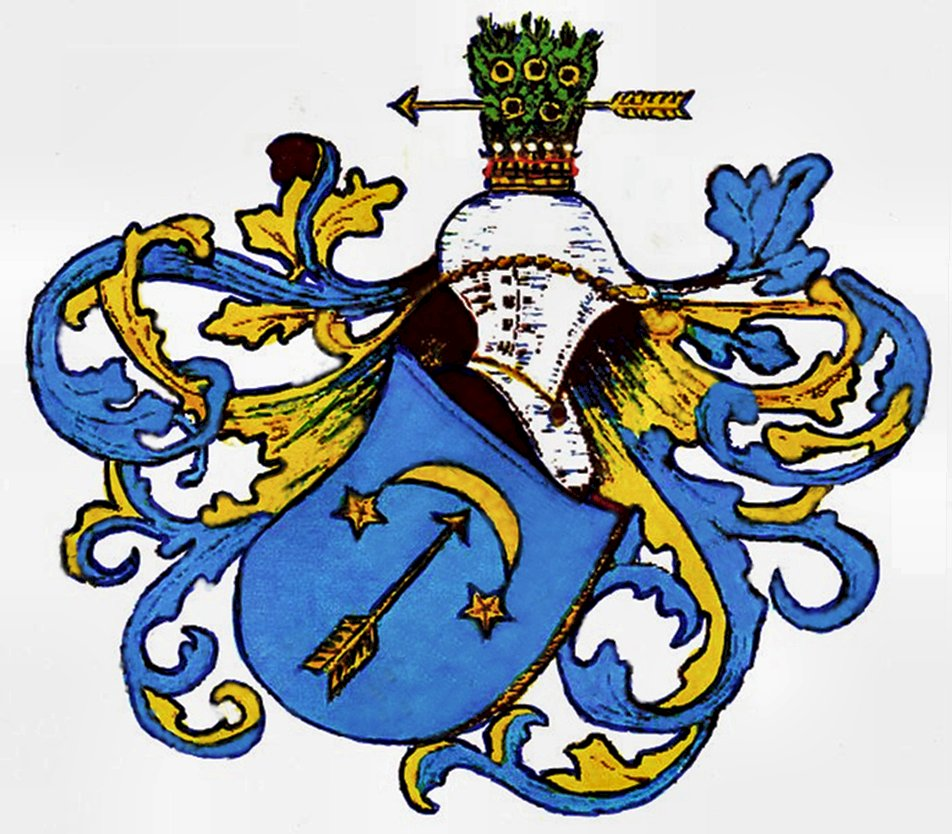 Wappen der Familie Wassilko, Ritter 1788, Freiherrn 1855, Grafen 1918